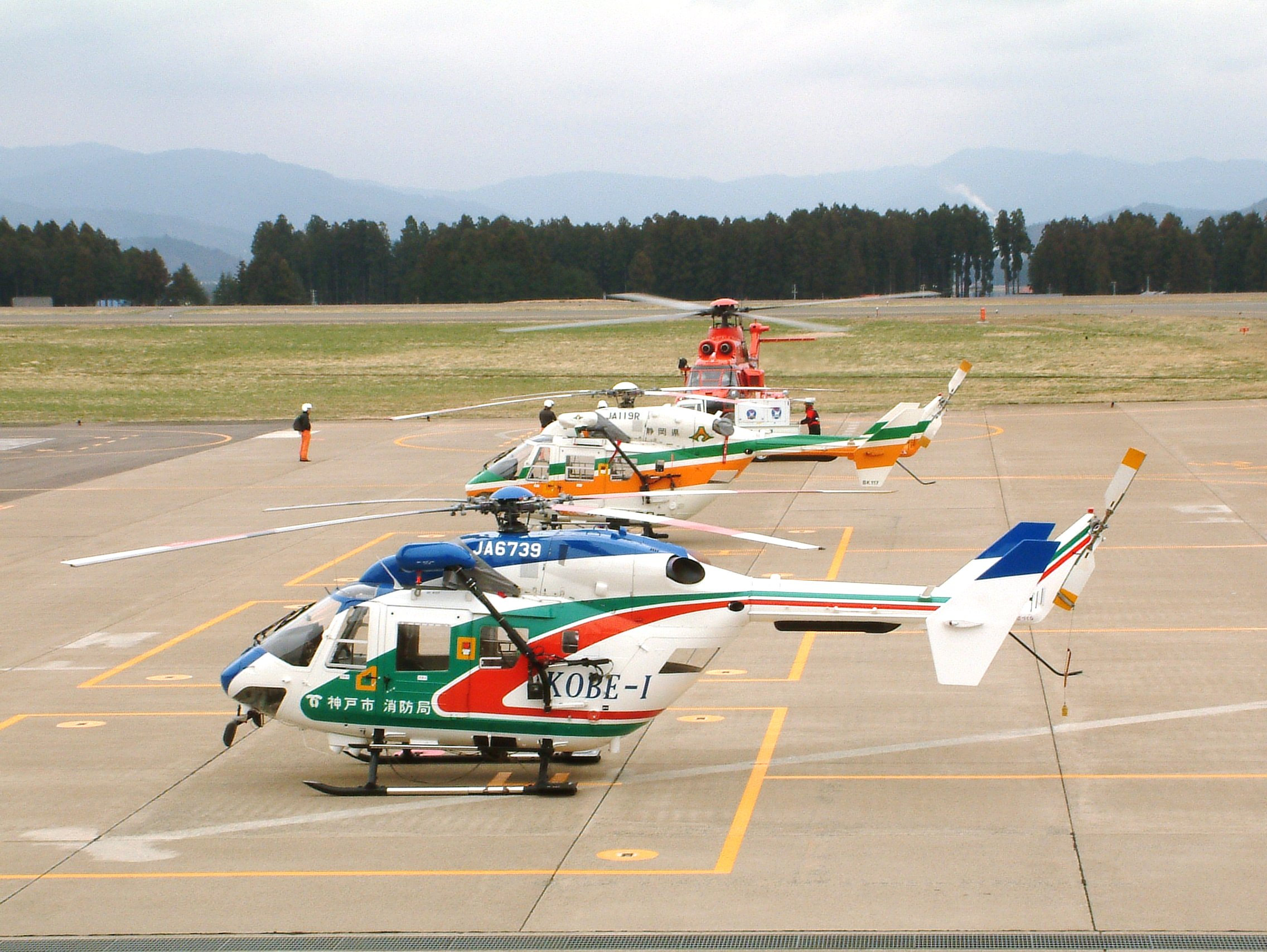 神戸市消防局/川崎BK117B-2/JA6739 静岡県消防防災航空隊/川崎BK117C-1/JA119R 東京消防庁航空隊/アエロスパシアルAS332L1/JA6720 撮影日/2011年4月11日 撮影地/花巻空港小型機エプロン（HNA/RJSI）